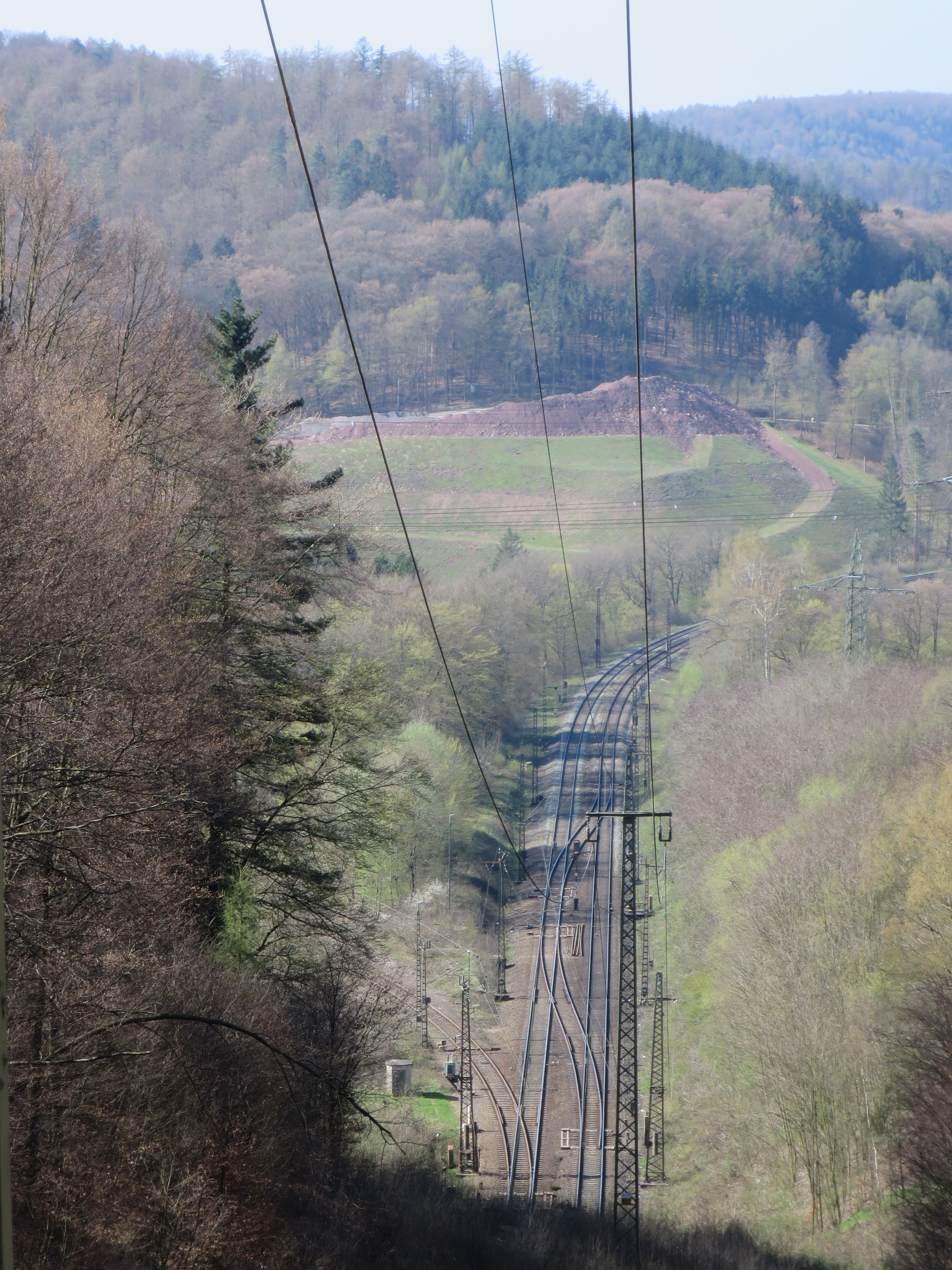 Üst / Betriebsbahnhof Heigenbrücken West vor dem Westportal des Schwarzkopftunnels